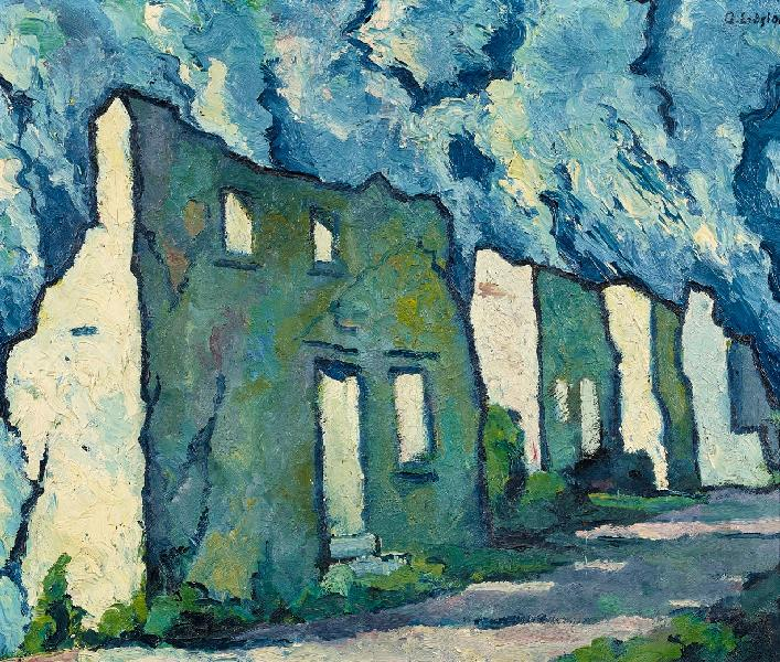 Adolf Erbslöh: Montigny. Öl auf Leinwand. 55,3 x 65,5 cm. Das Bild zeigt im Ersten Weltkrieg zerstörte Häuser in der französischen Stadt Montigny.